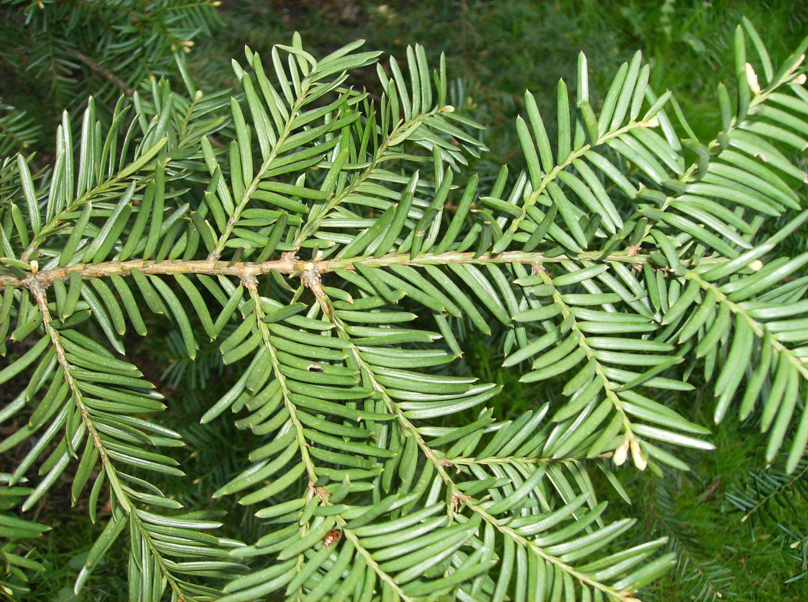 Taxus cuspidata